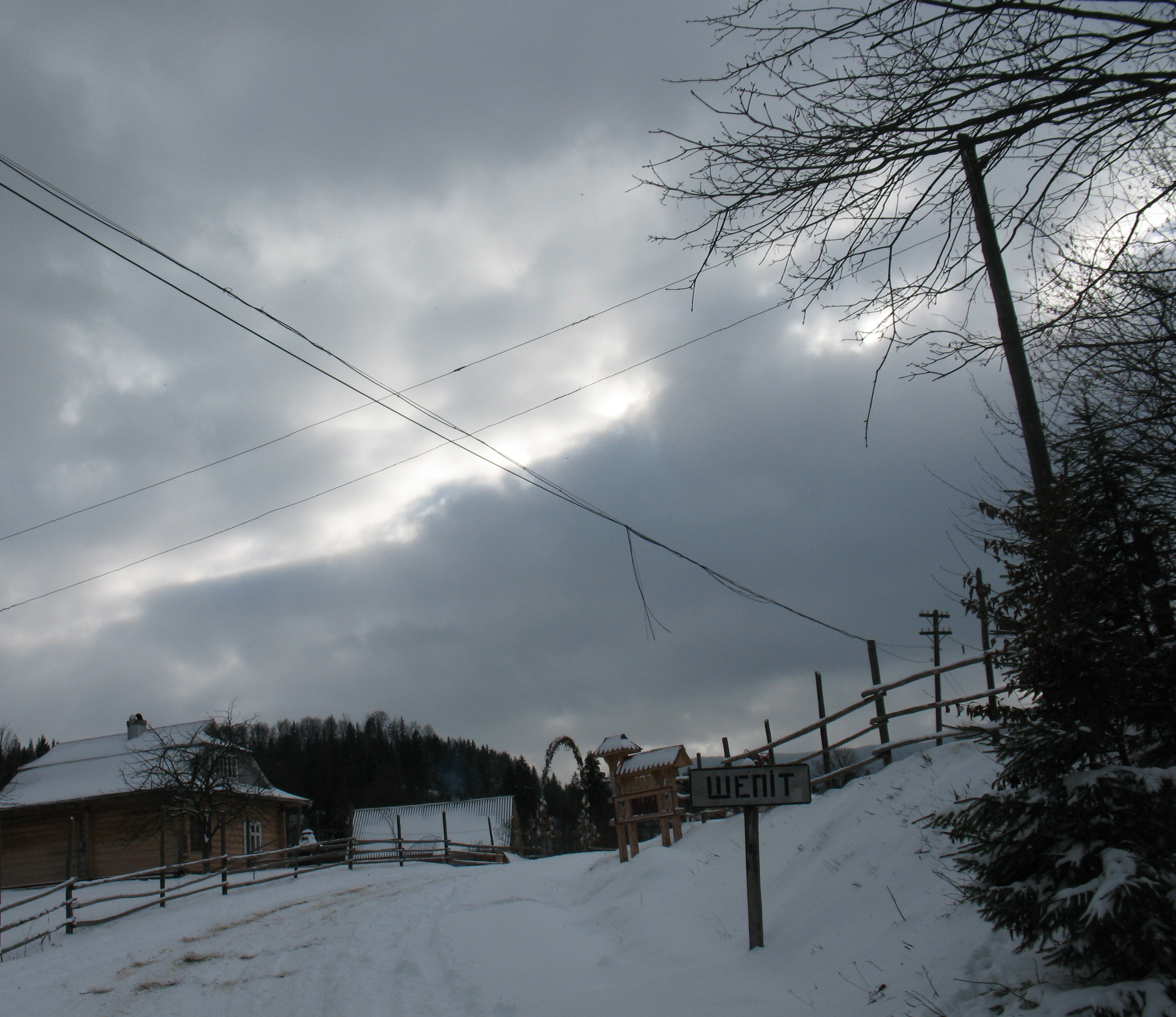 Початок села Шепіт